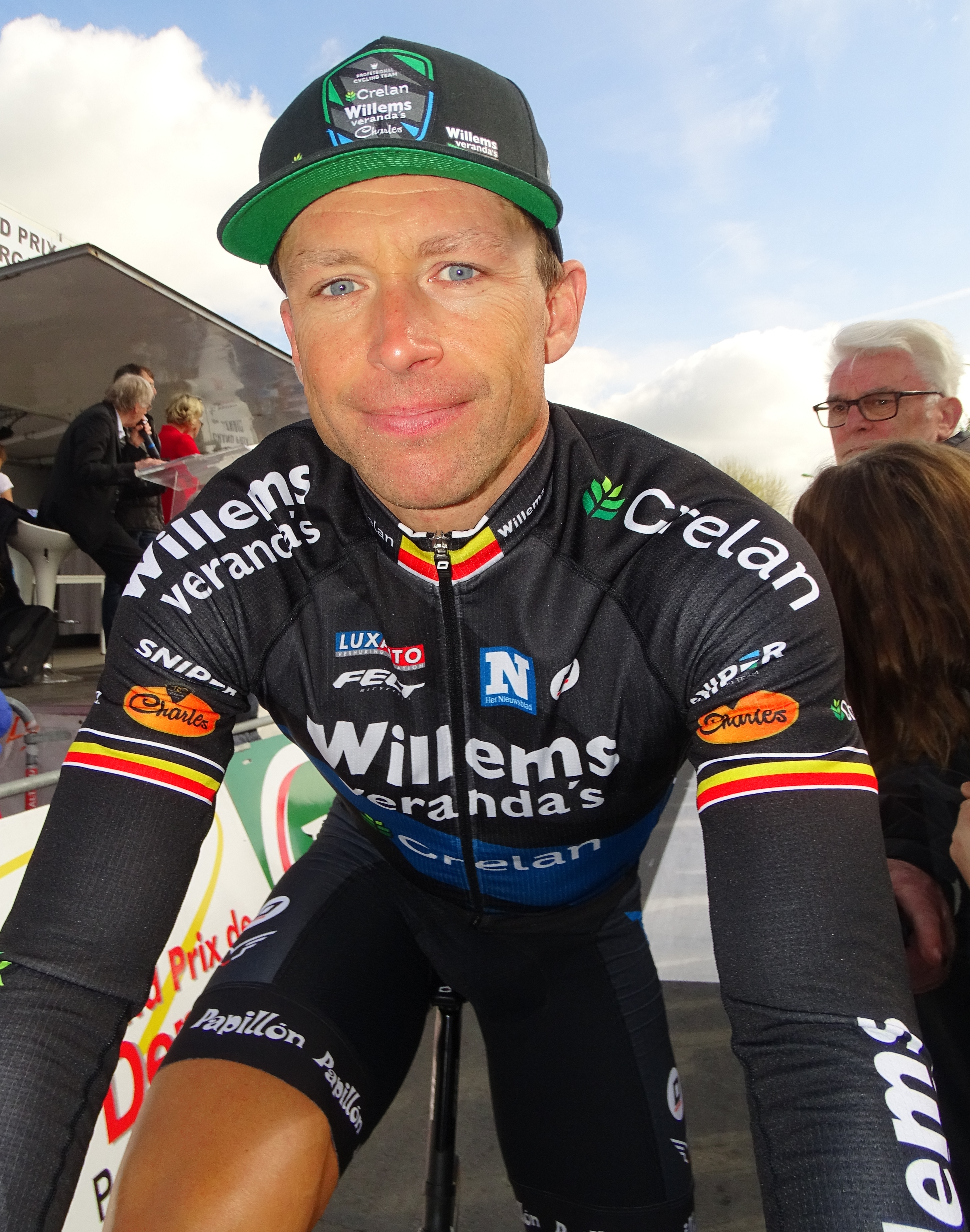 Reportage réalisé le jeudi 13 avril à l'occasion du départ et de l'arrivée du Grand Prix de Denain 2017 à Denain, Nord, Nord-Pas-de-Calais-Picardie, France.